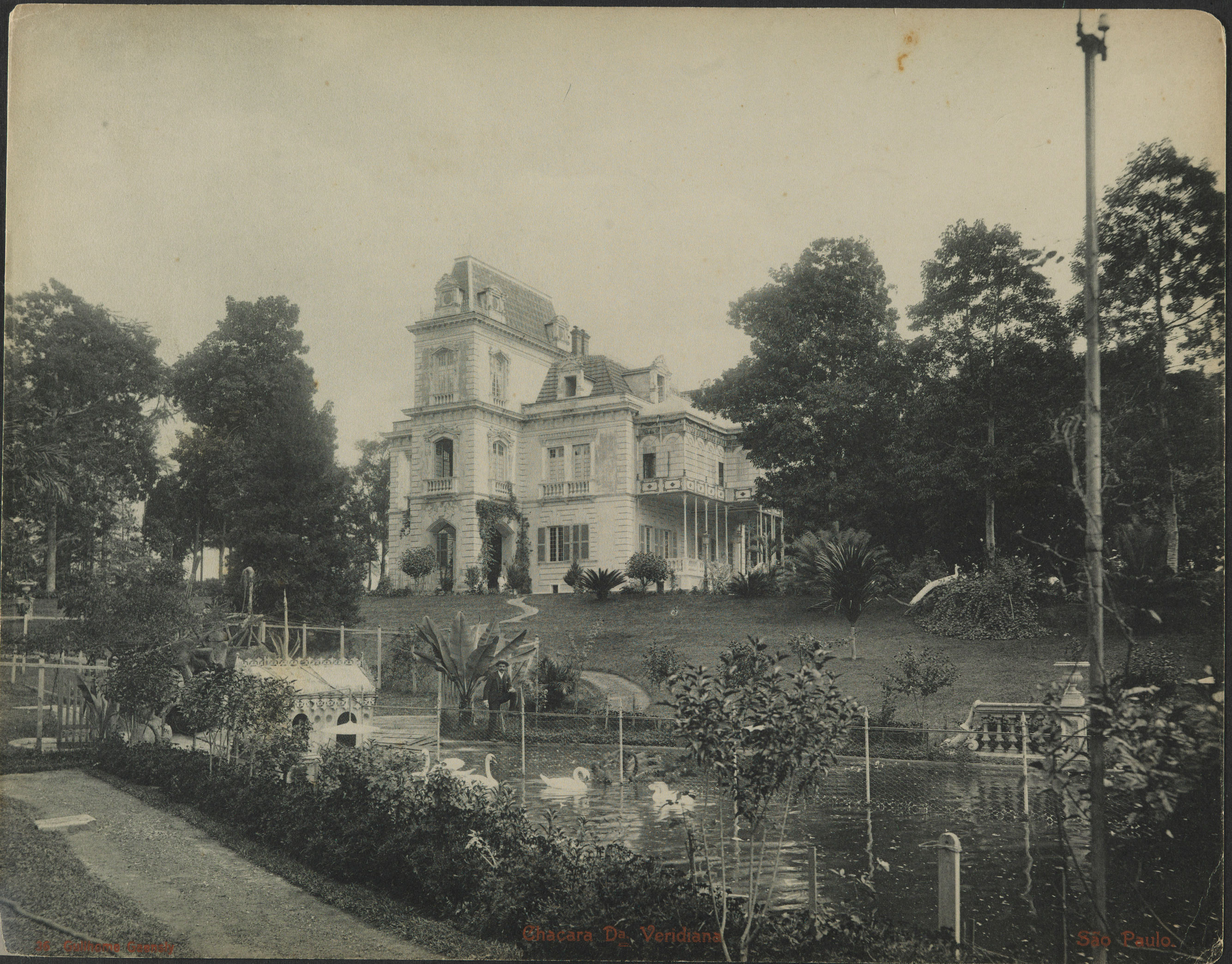 Chacara Da. Veridiana